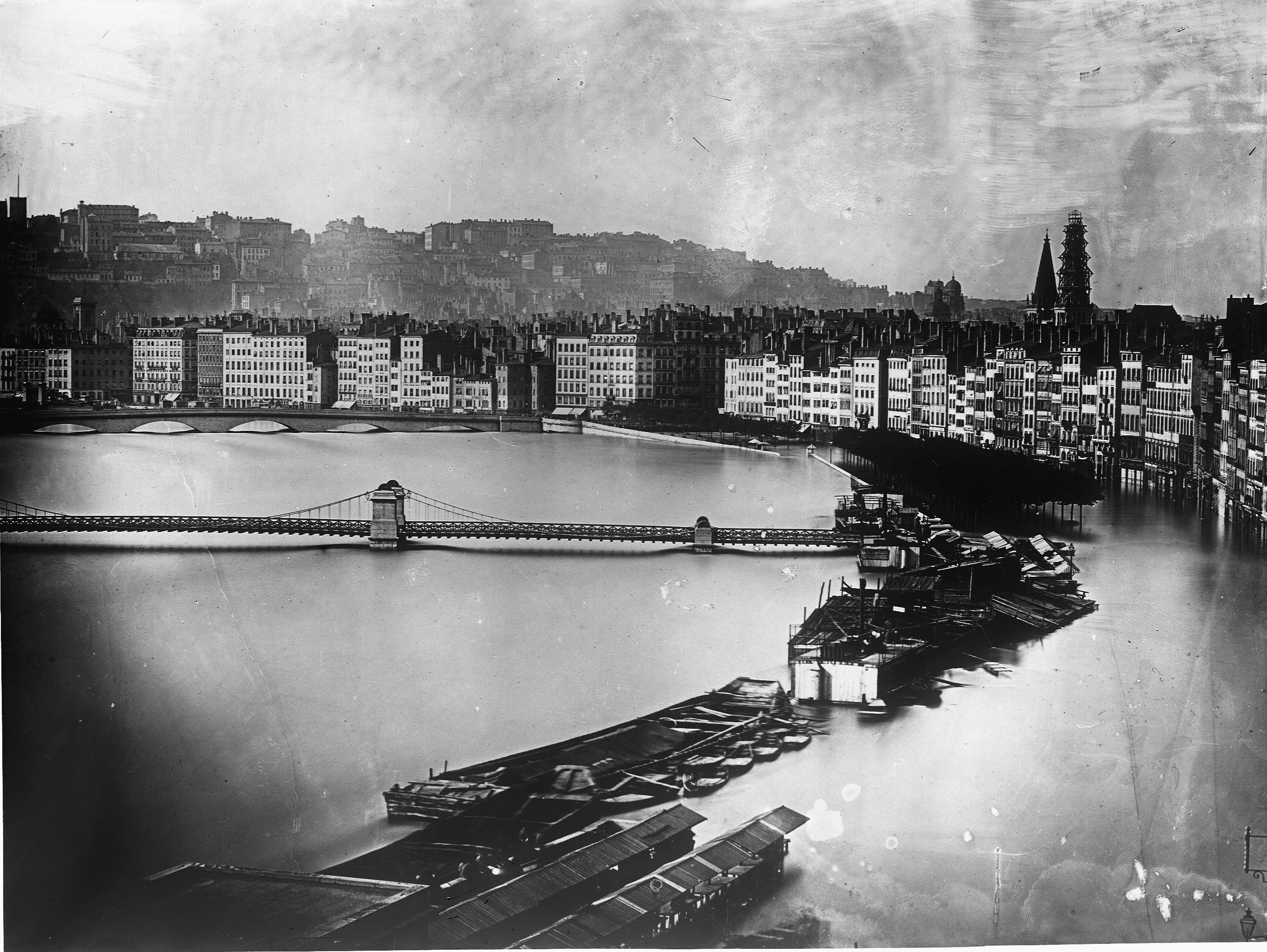 Photo de la Saône à Lyon au plus fort de la crue de 1856.